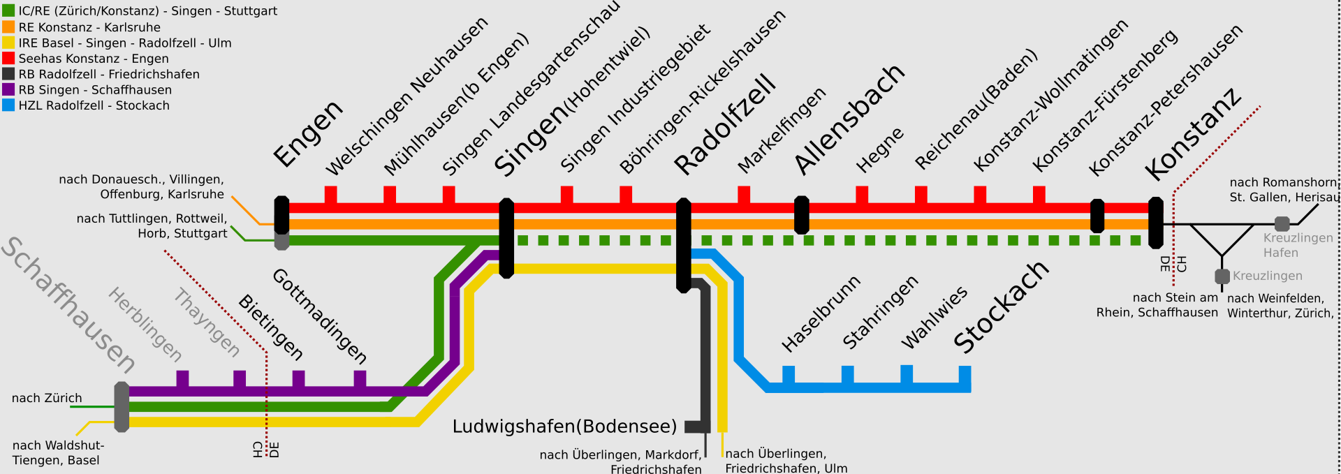 Dargestellt sind Zugläufe im Landkreis Konstanz. Stand 2019.